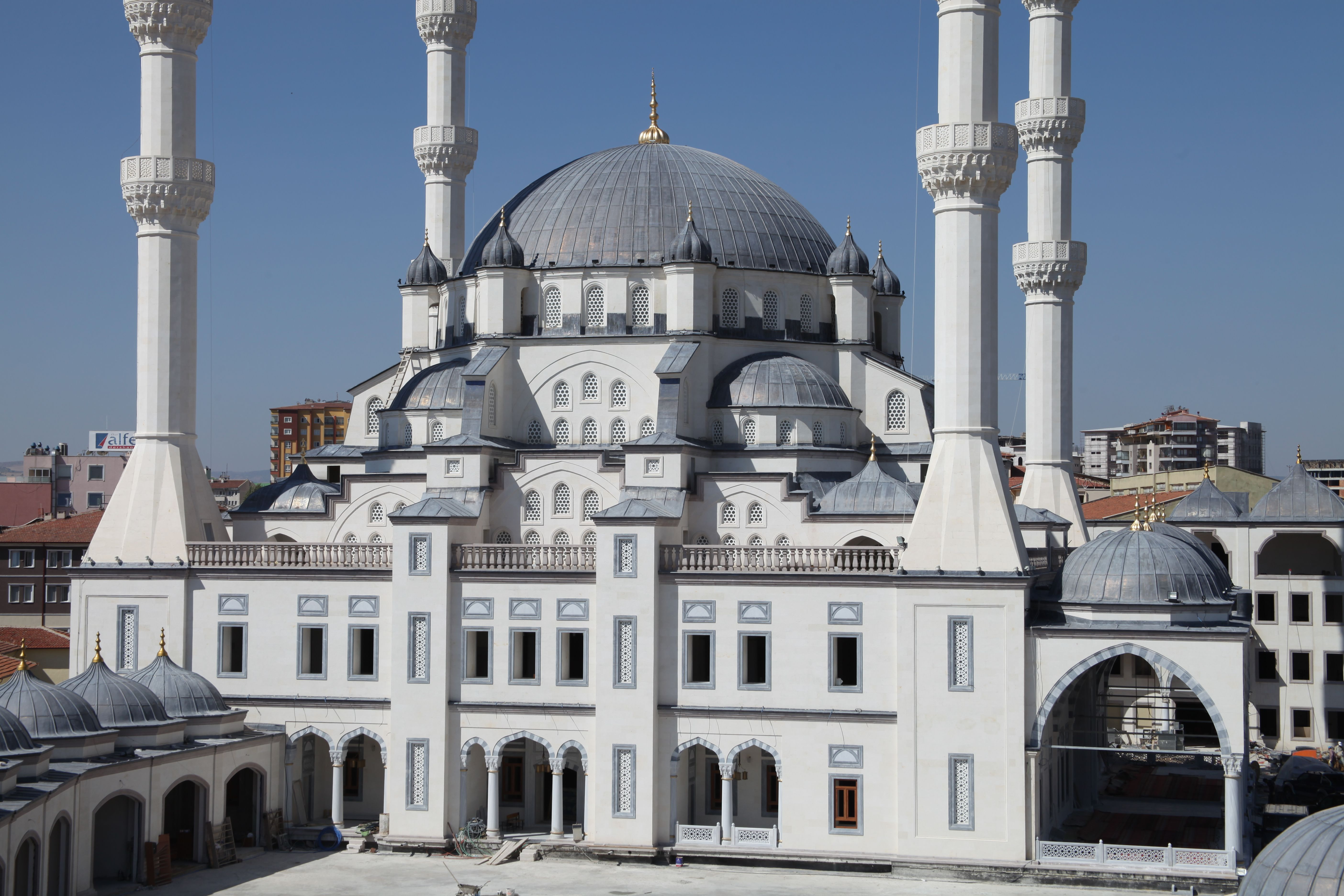 Kırıkkale Merkez Nur Camii